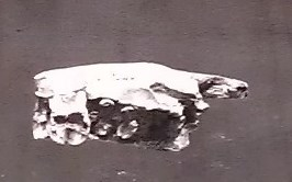 Réplica del fósil KNM-LT 329 o FT-L1 en el Museo de Ciencias Naturales de Madrid